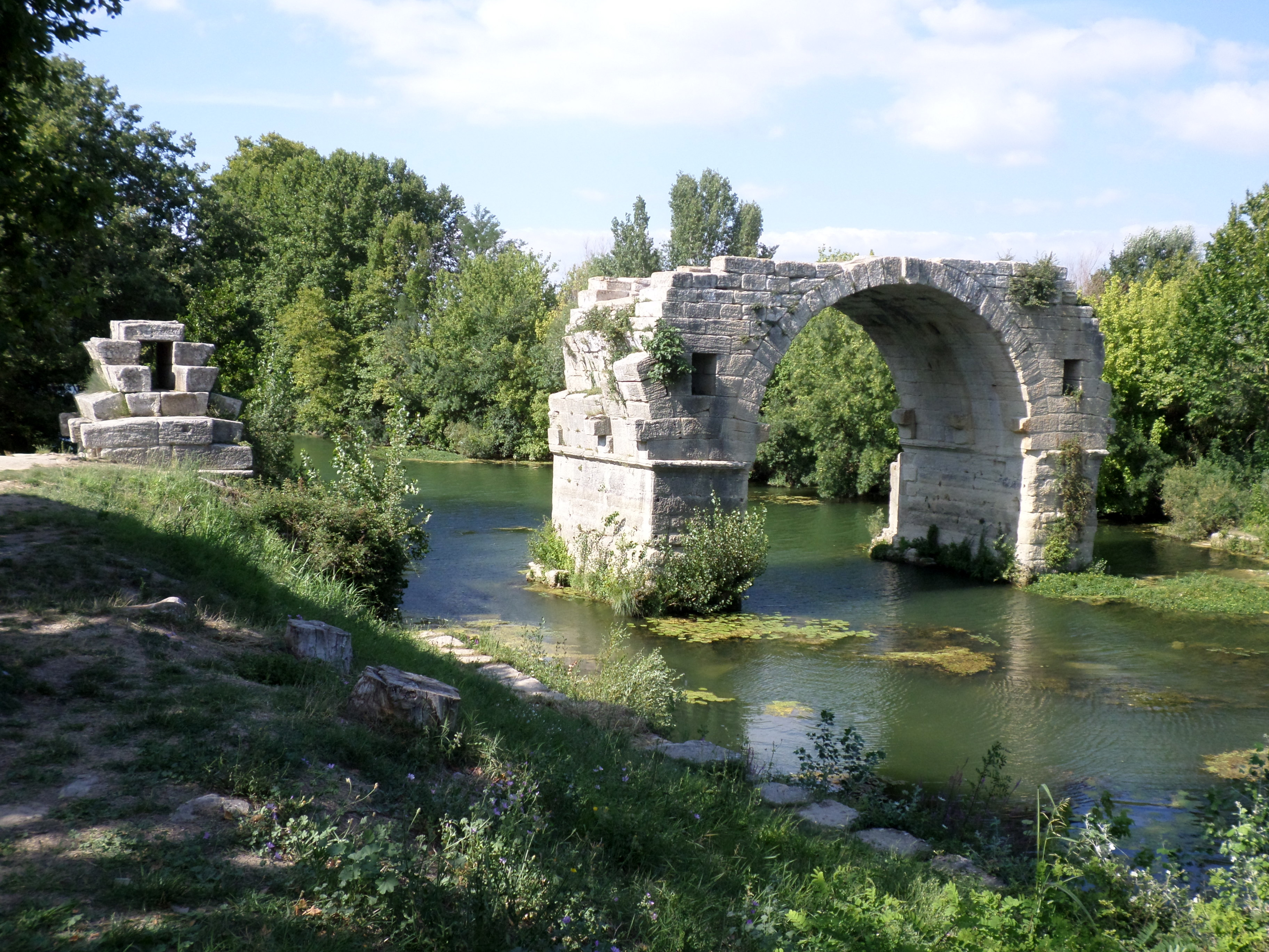 Vestiges du pont romain dit Pont Ambroix à Ambrussum